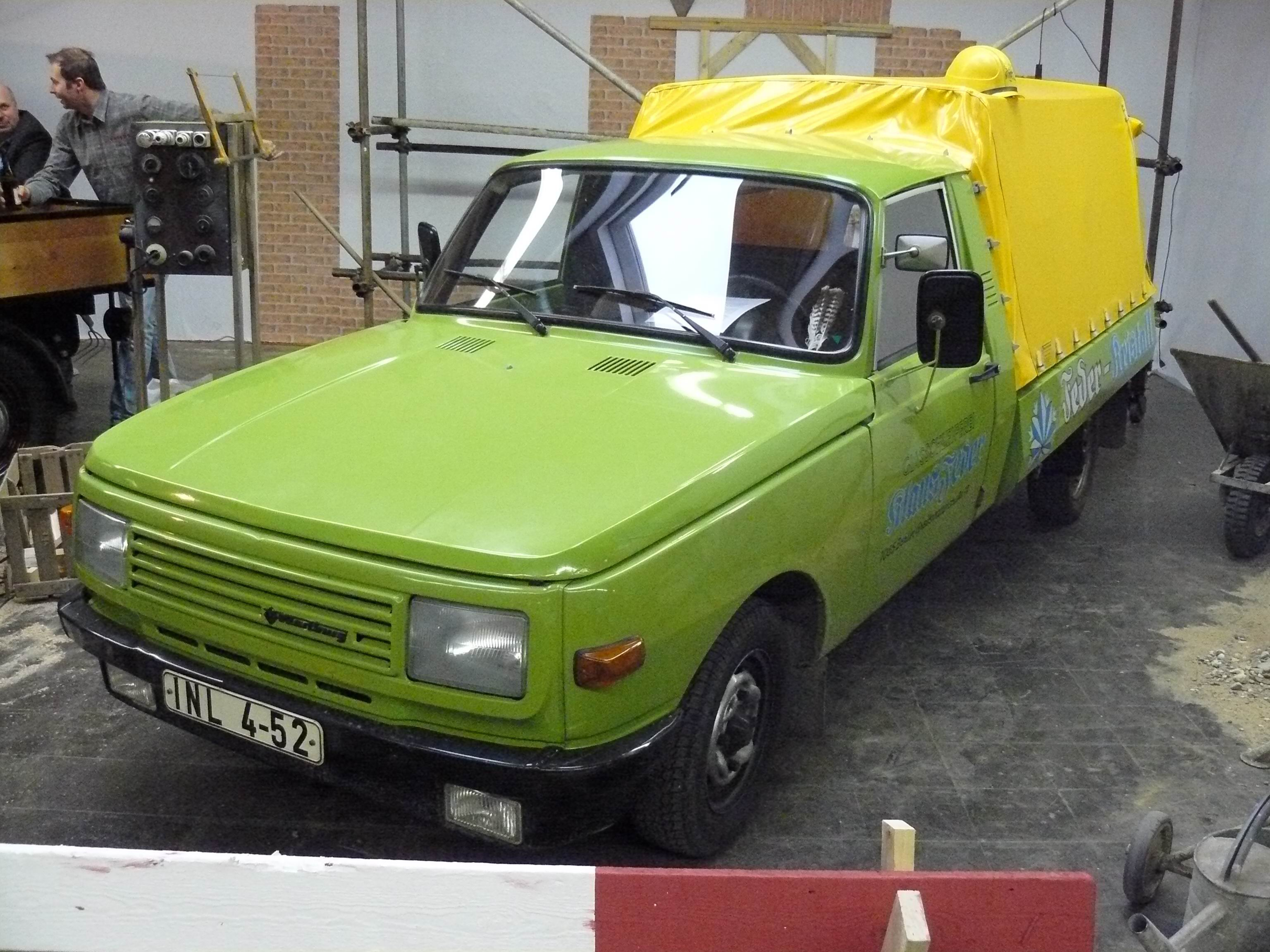 Essen 2011